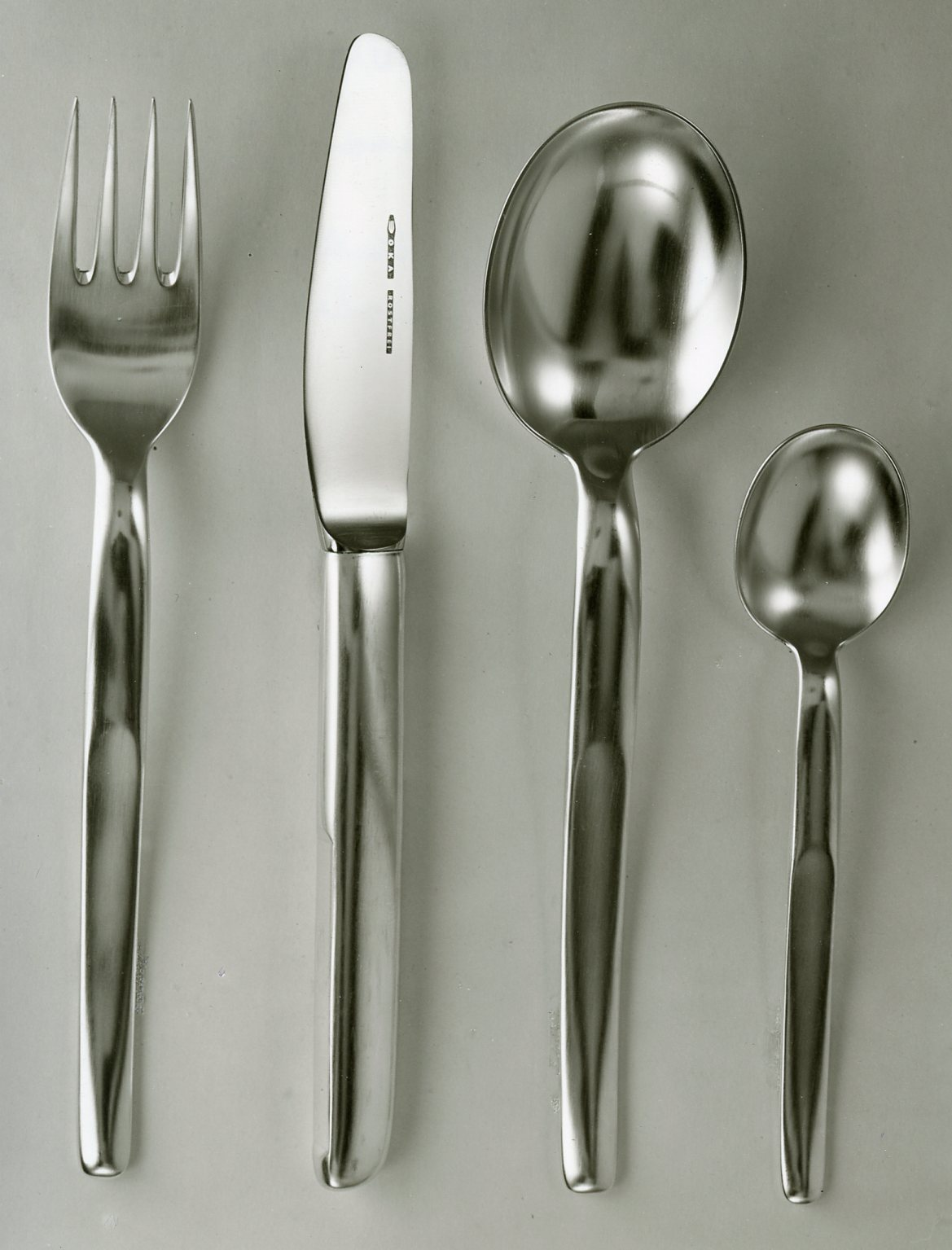 Essbesteck in Silber, gestaltet 1954 durch Hans Warnecke, Fertigung durch OKA Altensteig